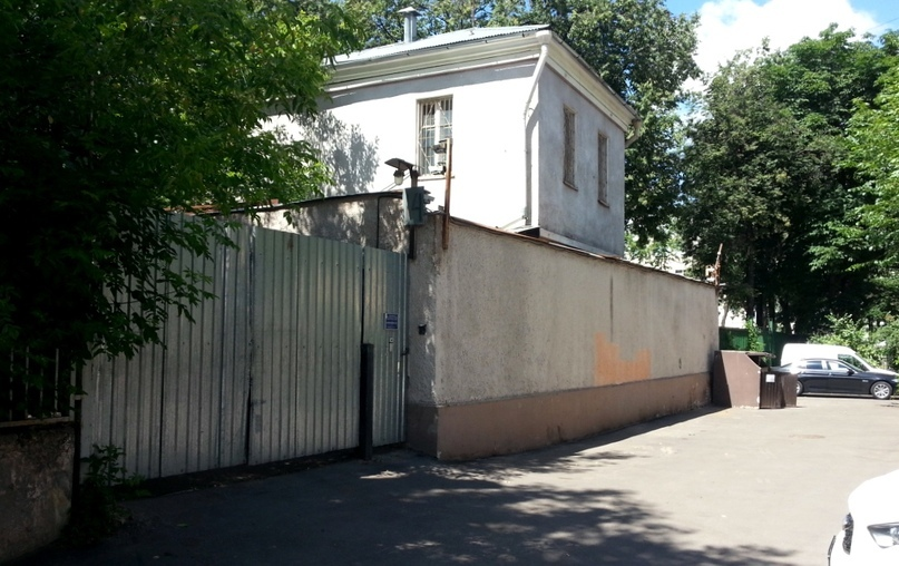 Маскировачное сооружение объекта ЧЗ-703